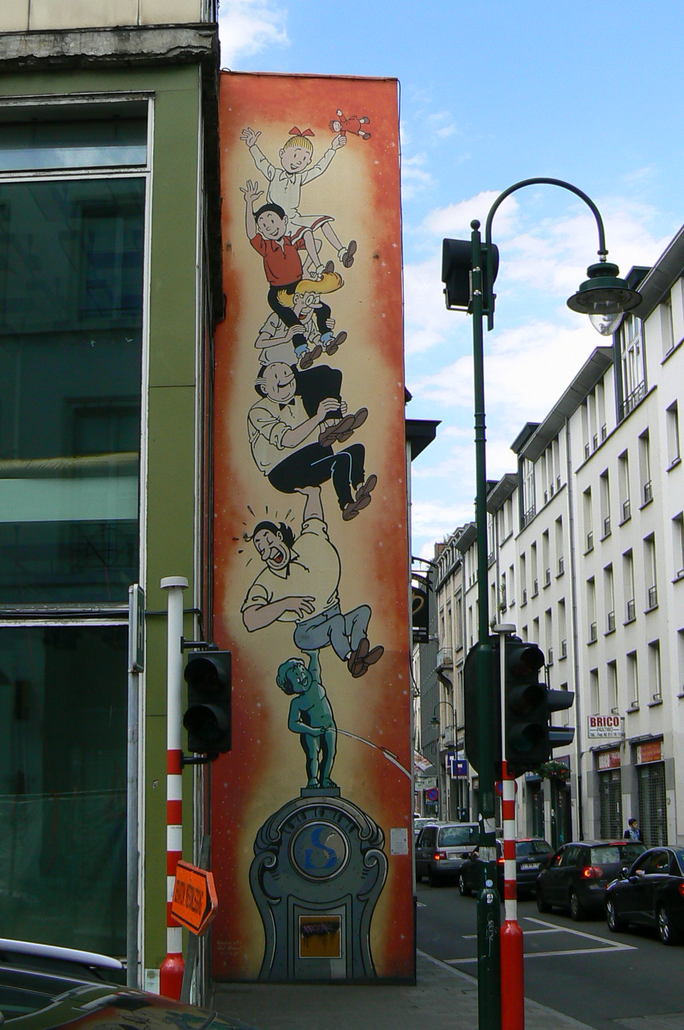 Stèle commémorative pour les 75 ans de Bob et Bobette en 2020.